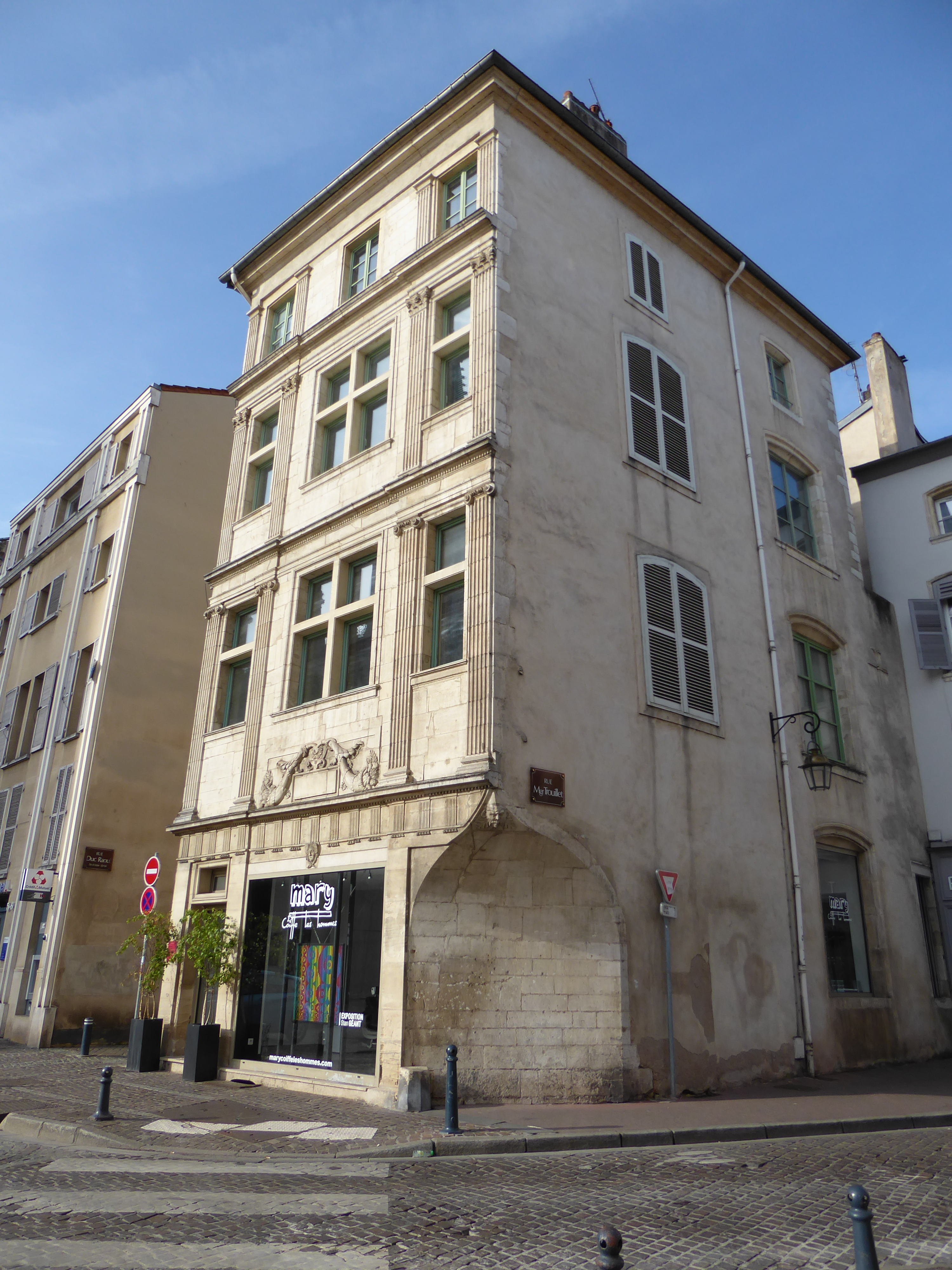 Immeuble 7 place Joseph-Malval à Nancy (Meurthe-et-Moselle). .